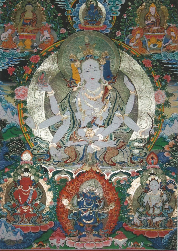 Fotografia della thanka di proprietà: Usnisha Vijaya o Namgyalma. In alto a sinistra Buddha, in alto a destra Lama Tsongkhapa.